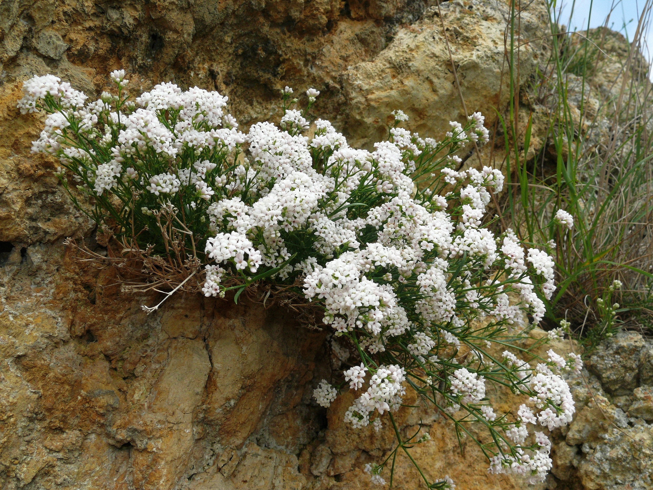 Asperula cynanchica, Nördlinger Ries, Deutschland